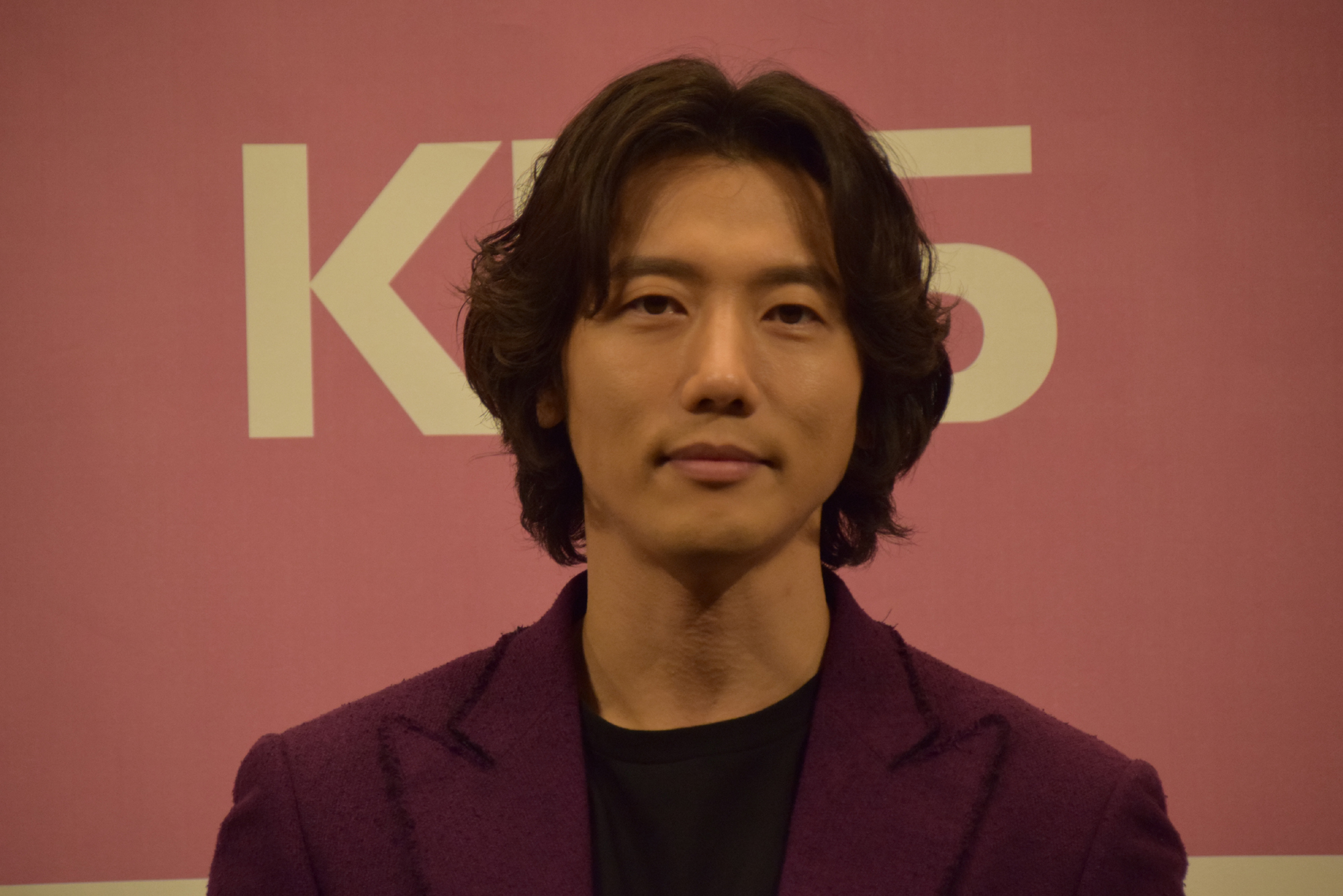 2019년 3월 19일 서울 강남구 임피리얼팰리스호텔 셀레나홀에서 열린 KBS 2TV 새 주말드라마 '세상에서 제일 예쁜 내 딸' 제작발표회장에서의 기태영